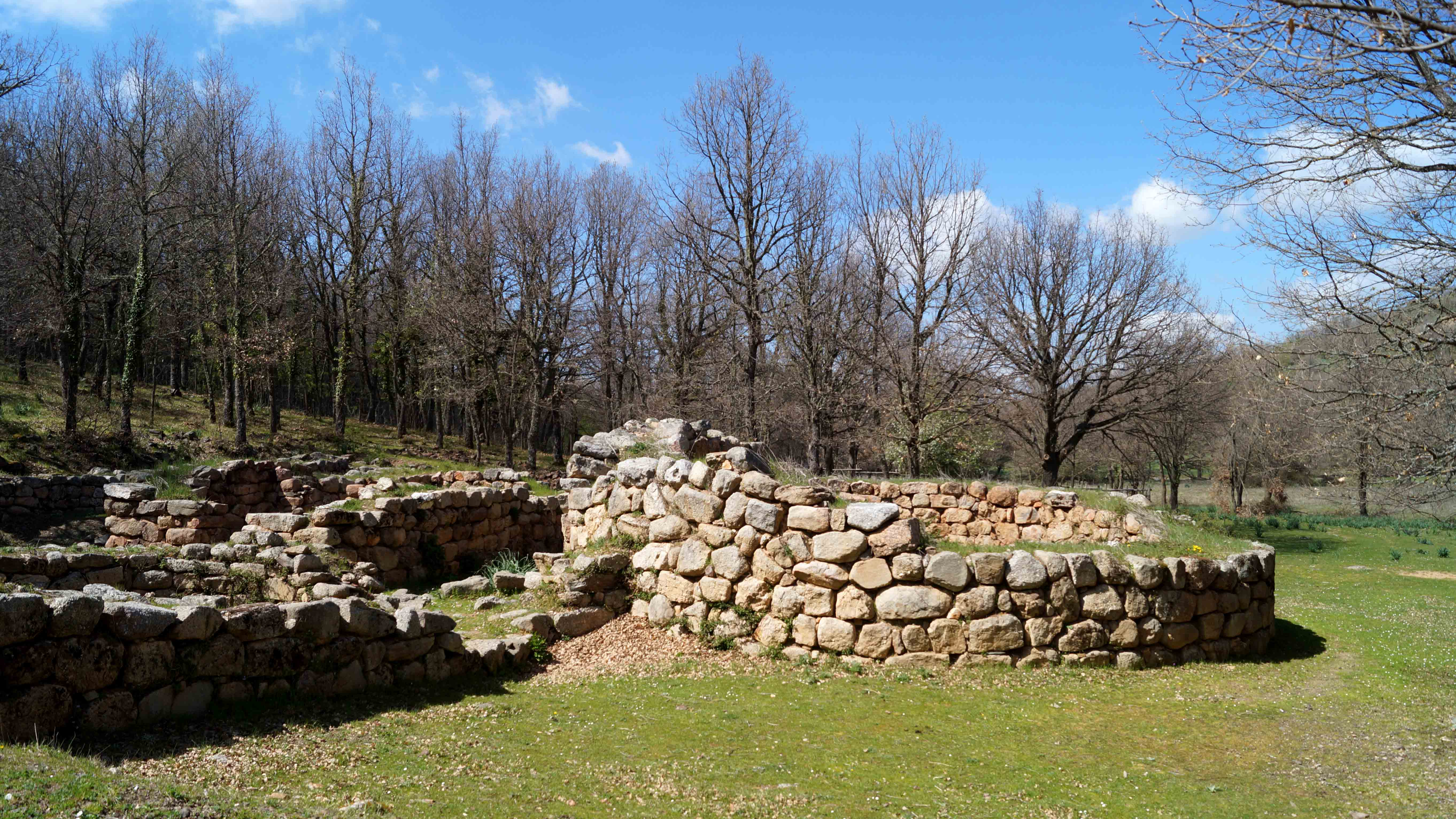 Santuario nuragico di Gremanu - Fonni This is a photo of a monument which is part of cultural heritage of Italy.